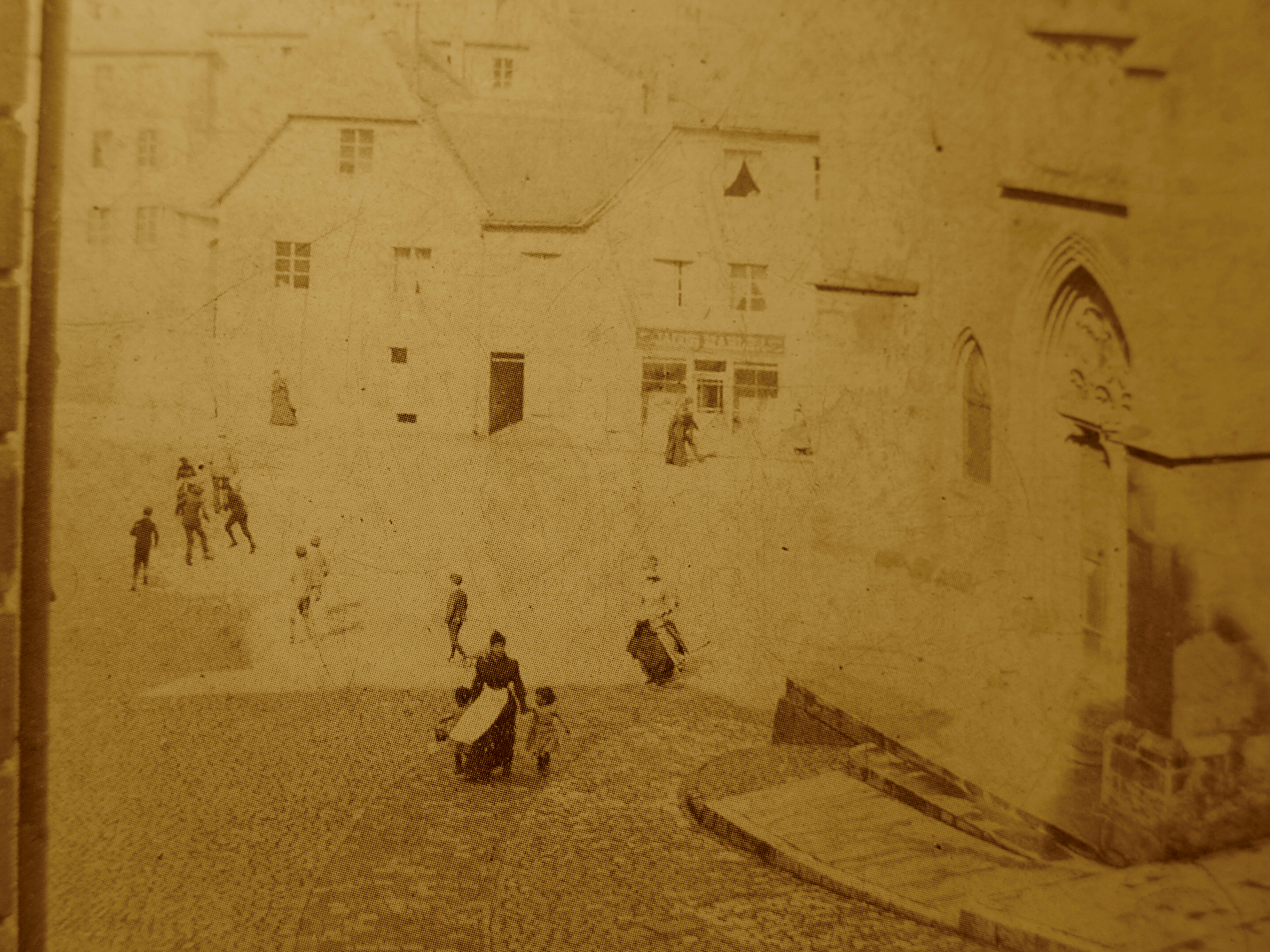 Saarbrücken; Straße "Am Schlossberg" mit Blick auf das Manufakturwarengeschäft des Carl Jacob Schultz, in dessen Haushalt Katharine Weißgerber lebte und arbeitete; rechts das Portal der Schlosskirche (Stadtarchiv Saarbrücken)